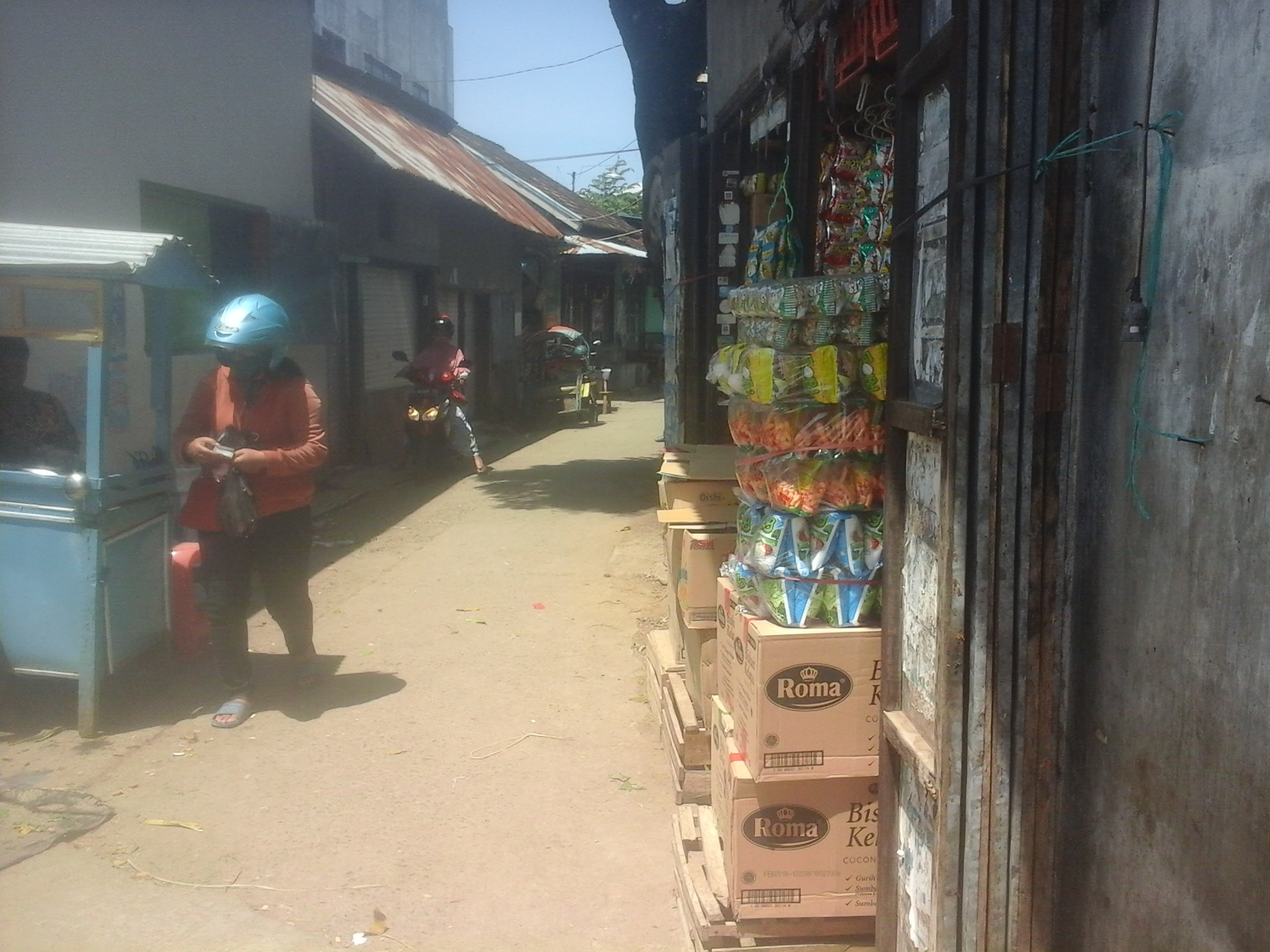 Jl. Nias dahulu merupakan lokasi belokan rel Kereta dari Stasiun Ponorogo menuju Stasiun Badegan. Jalur ini ditutup dan di bongkar pada masa penjajahan Jepang.